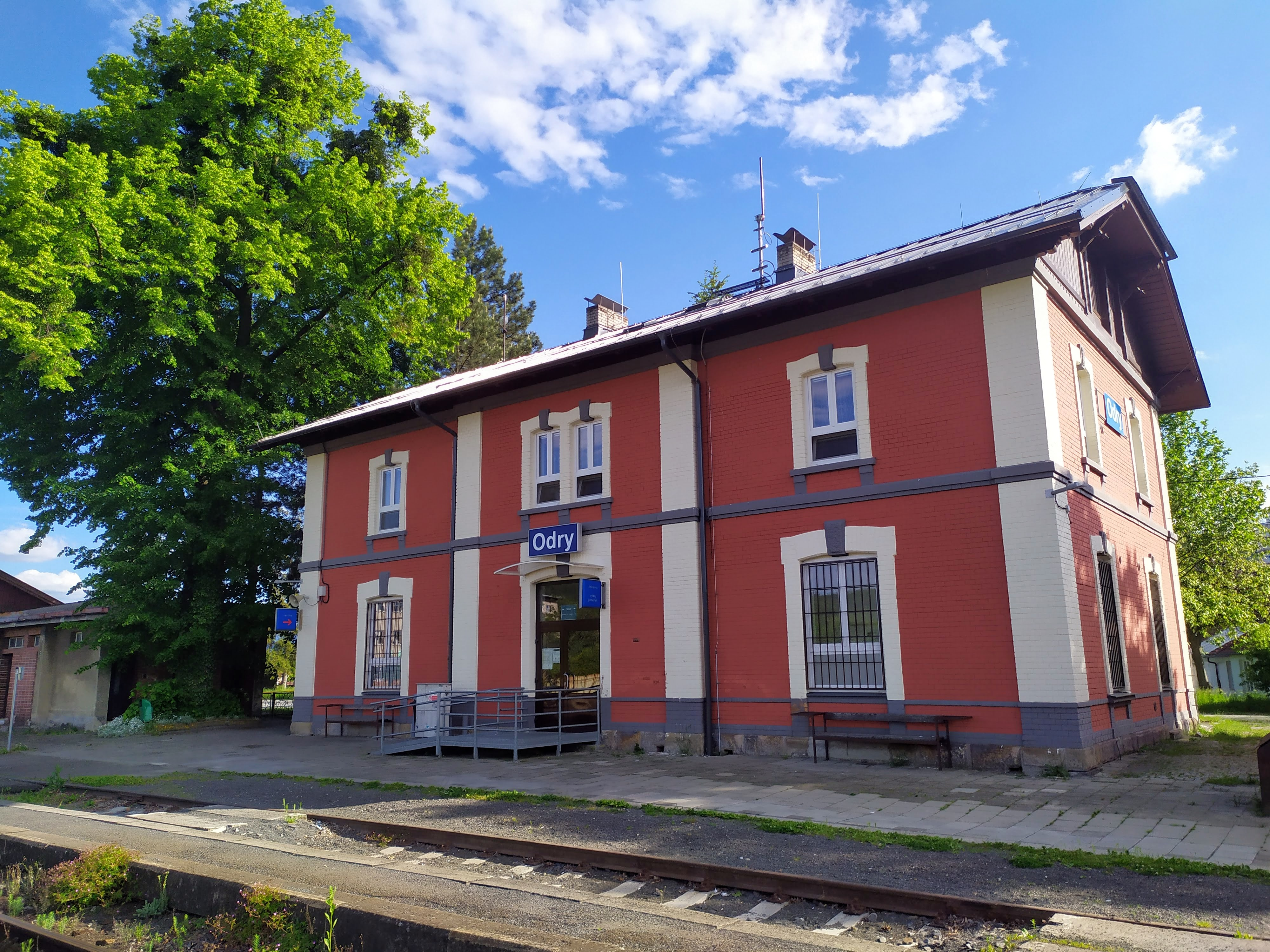 Vlakové nádraží v Odrách